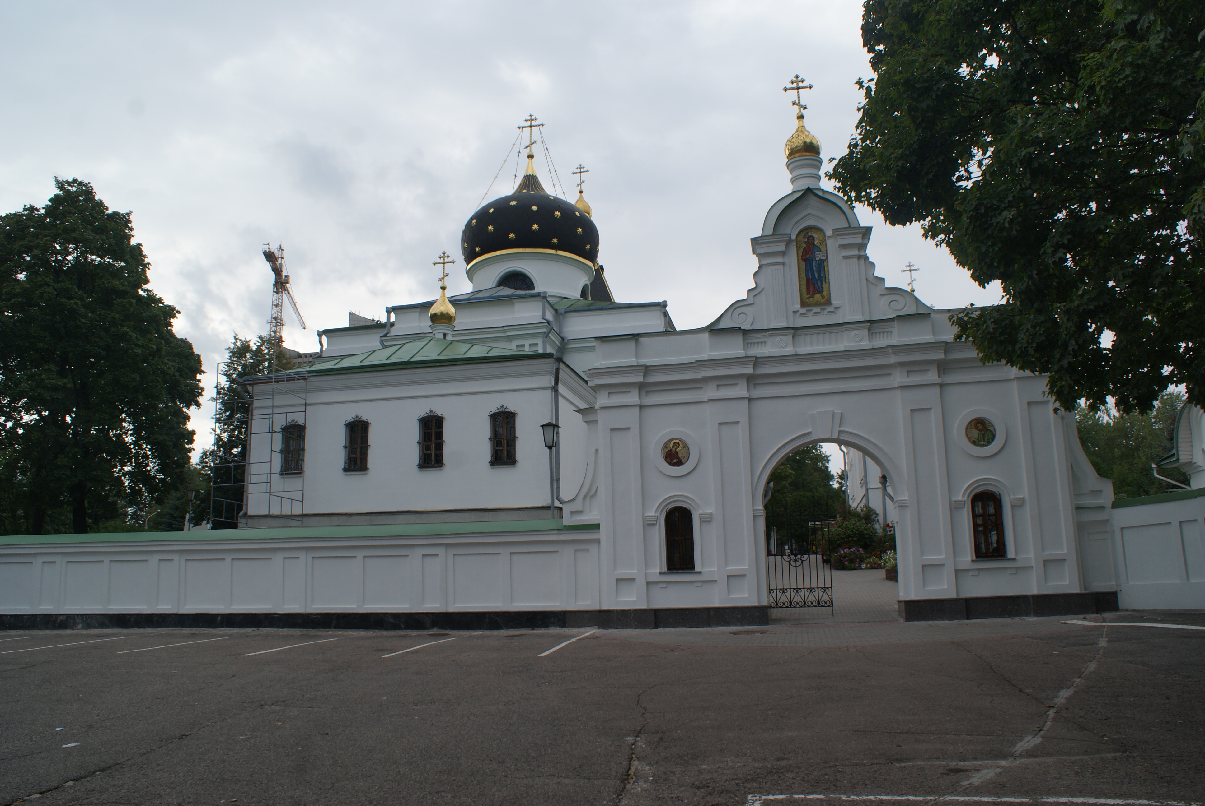 Беларуская (тарашкевіца): Царква Марыі Магдалены і Старажоўская брама. г. Менск This is a photo of Belarusian heritage monument. Reference number: 713Г000084 ( WLM)